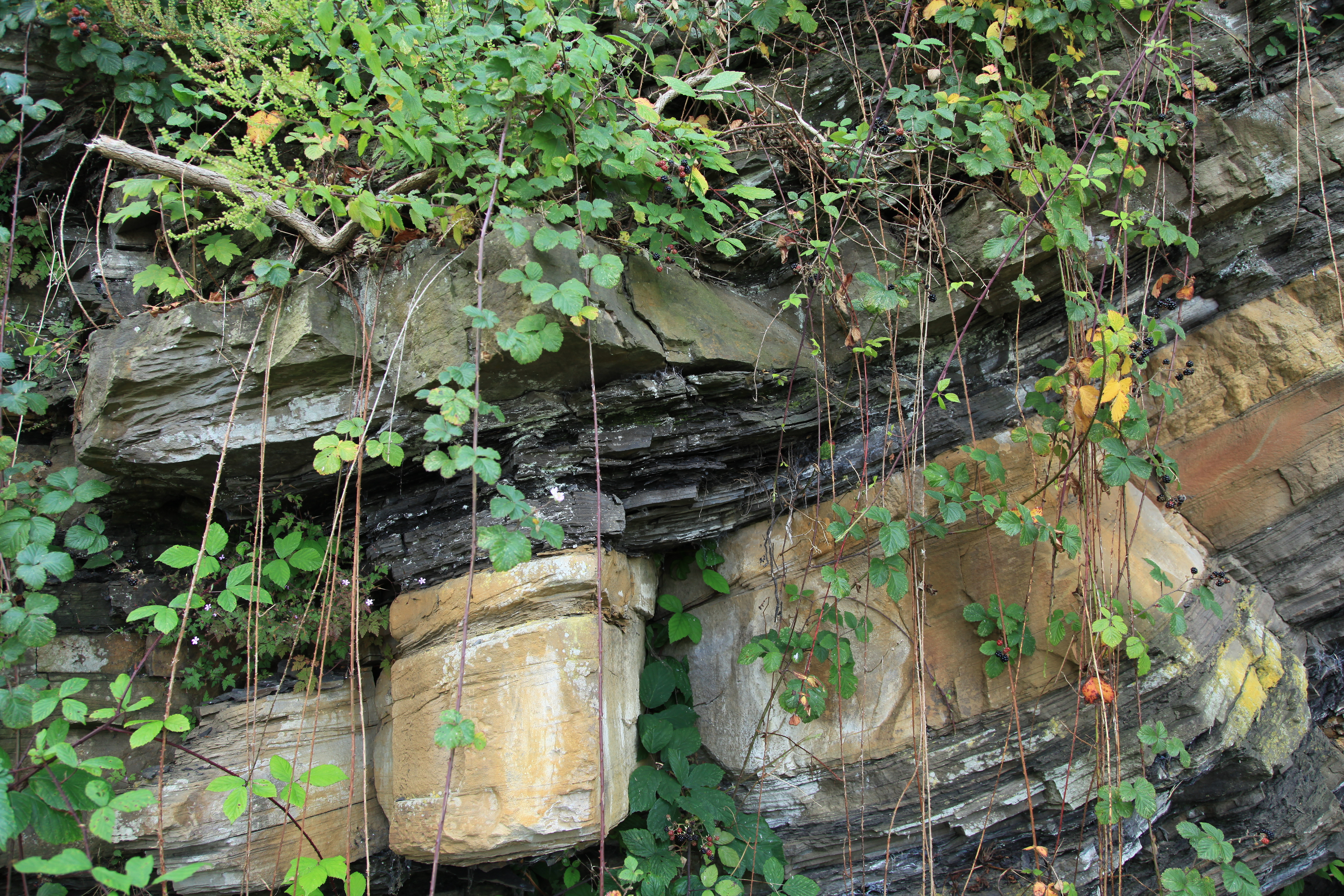 Geologischer Aufschluss am Schiffswinkel, Im Schiffwinkel in Herdecke